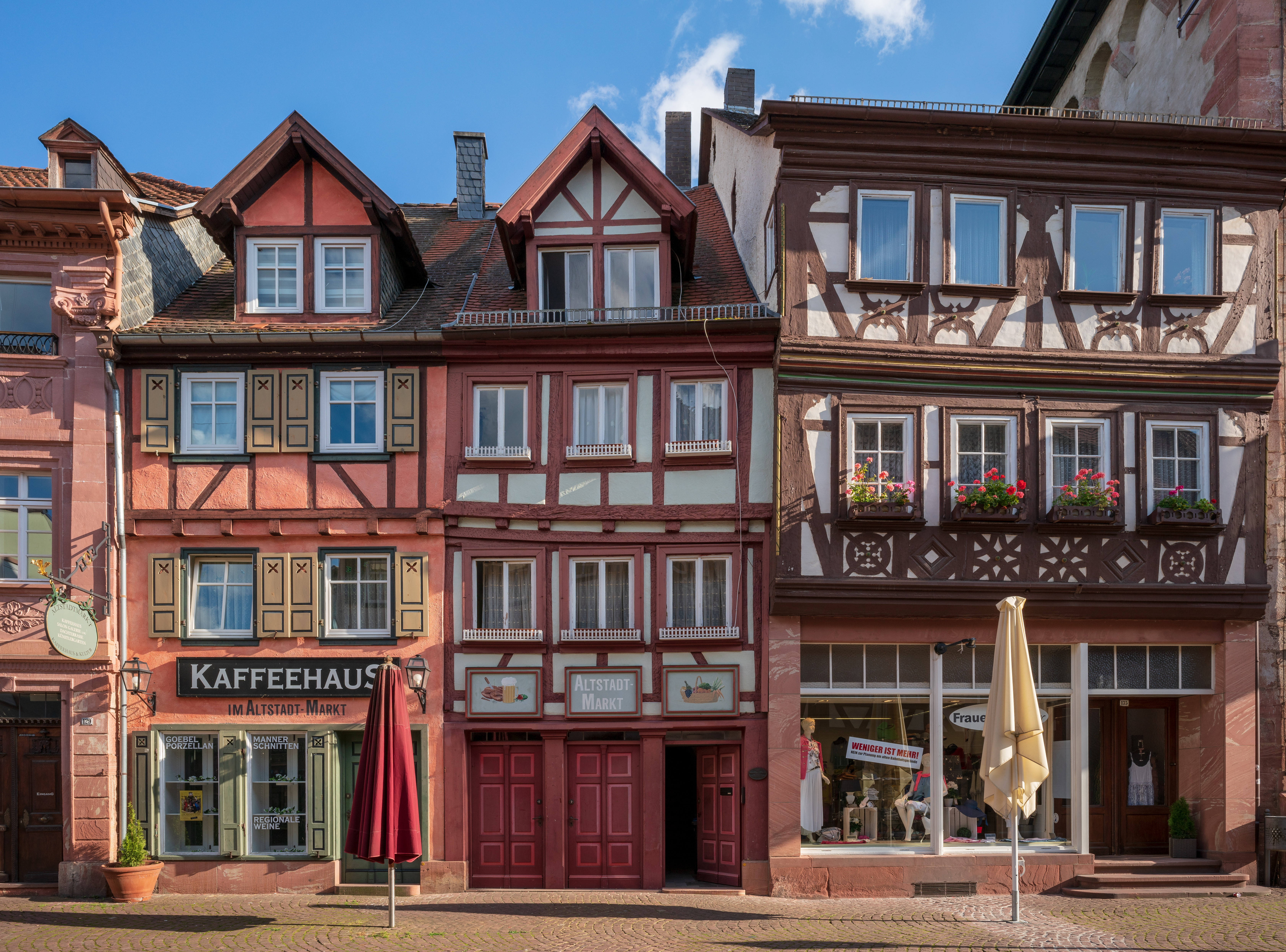 Miltenberg: Die denkmalgeschützten Häuser Hauptstraße 131, 133, 135 (von links nach rechts) bilden ein malerisches Ensemble. Aufnahme mit Abendsonne, daher die leuchtenden Farben.This is a photograph of an architectural monument. is a photograph of an architectural monument.